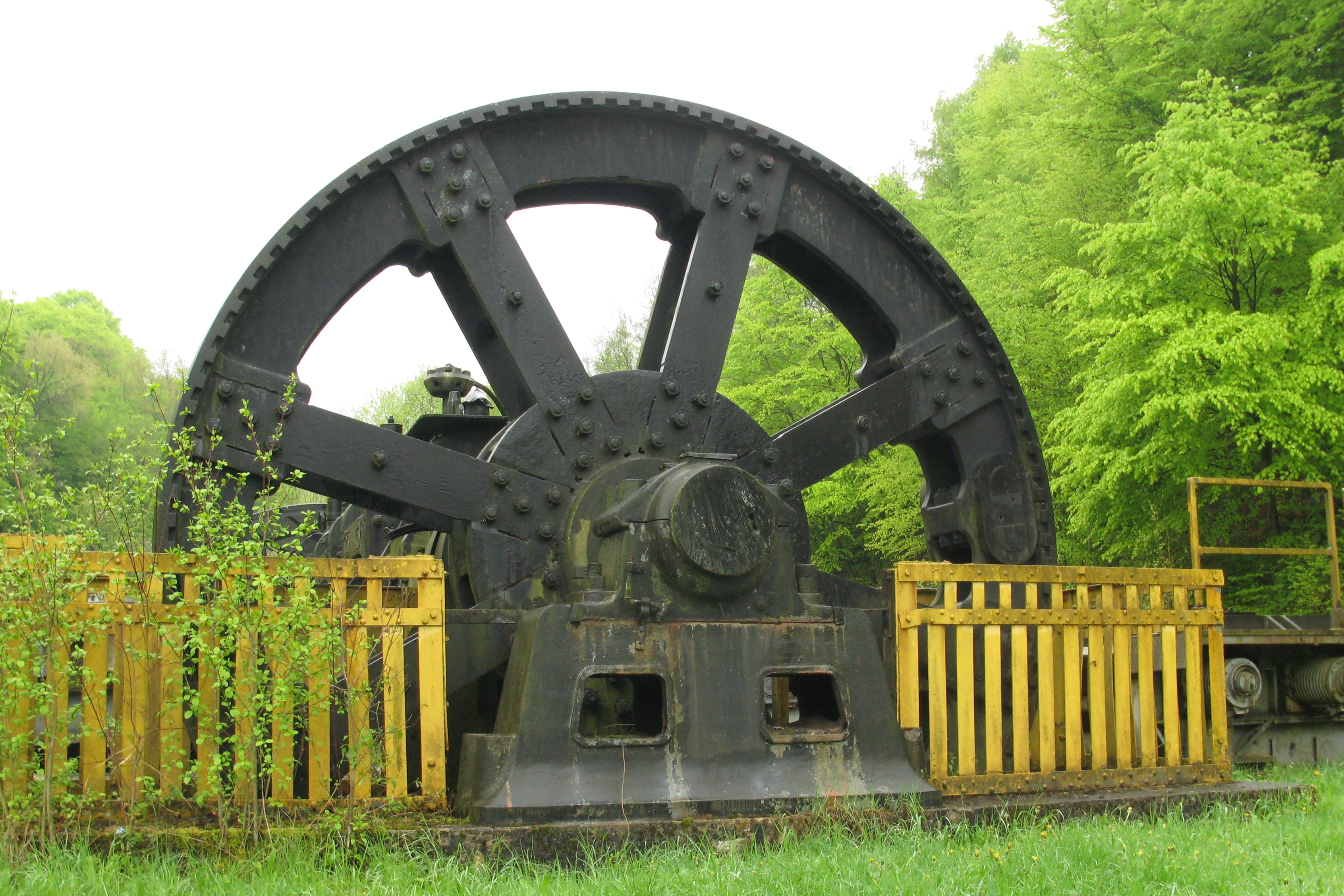 Schwonkrad vum Undriff bei engem Walzwierk. Kategorie:Industriell Installatiounen Kategorie:Maschinnebau Kategorie:Maschinnenelementer Kategorie:Industrie- an Eisebunnspark Fond-de-Gras